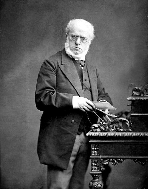 Adolph von Menzel ADN-Zentralbild/Archiv Adolph von Menzel, Maler, Graphiker und zeichner Hauptvertreter des bürgerlichen Realismus in Deutschland im 19. Jhd. geb. 8.12.1815 in Breslau (Wroclaw), gest. 9.2.1905 in Berlin, wo er seit 1830 lebte 36585-33 Abgebildete Personen: Menzel, Adolph von: Maler, Grafiker, Zeichner, Deutschland (GND 118580914)